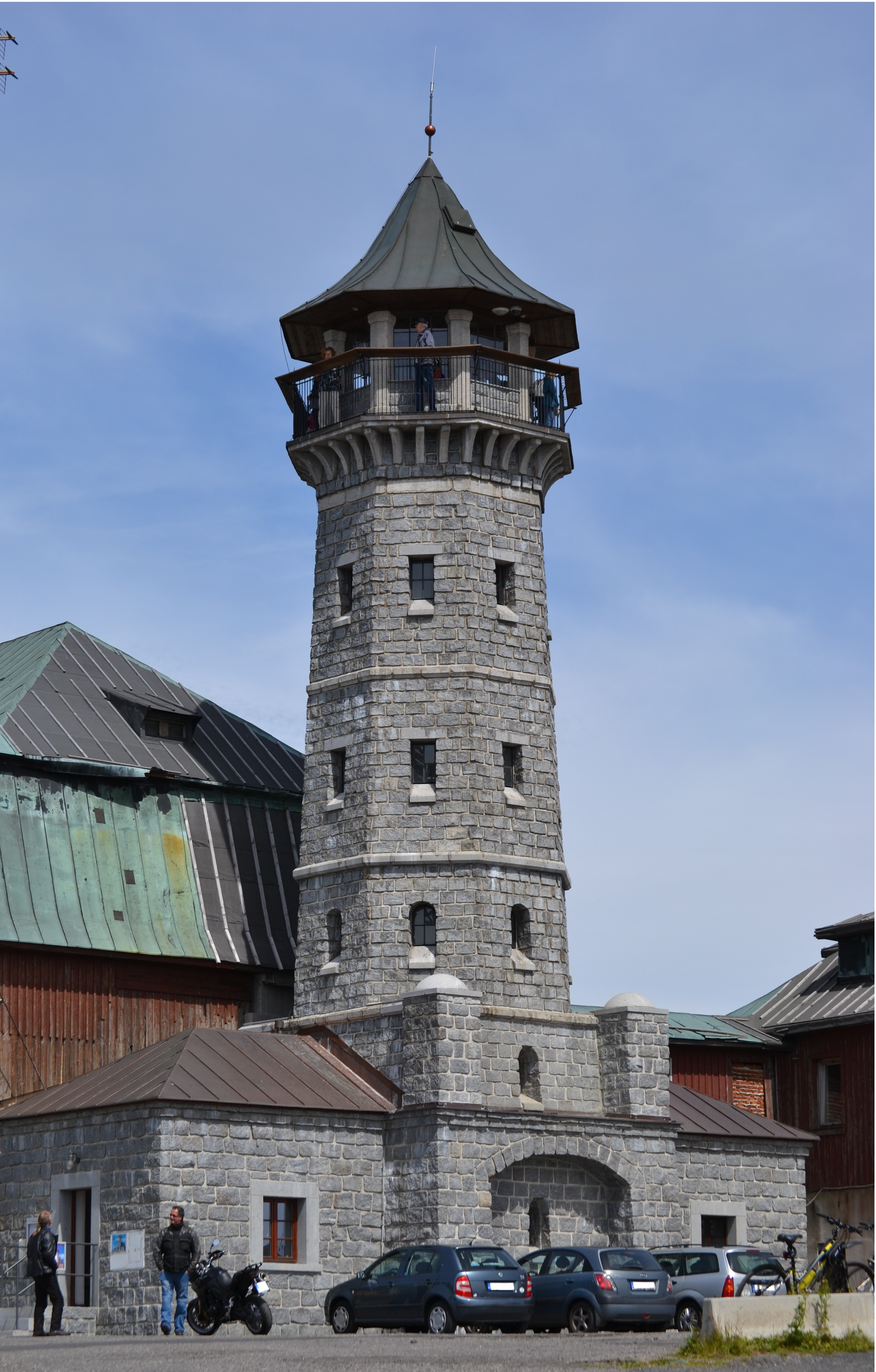 Der 2013 wiedererichtete Aussichtsturm auf dem Klínovec im Erzgebirge.